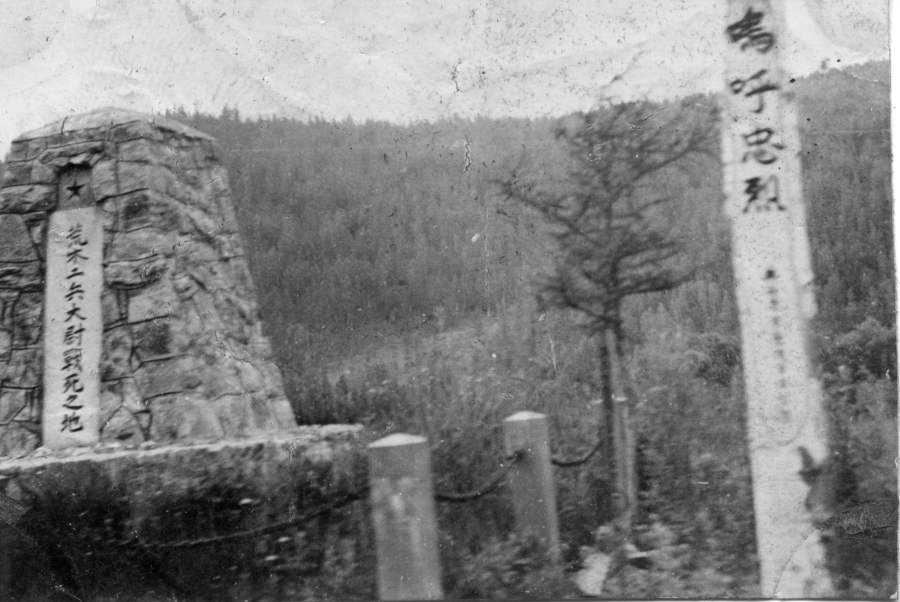 荒木大尉終焉の地に作られた記念碑。